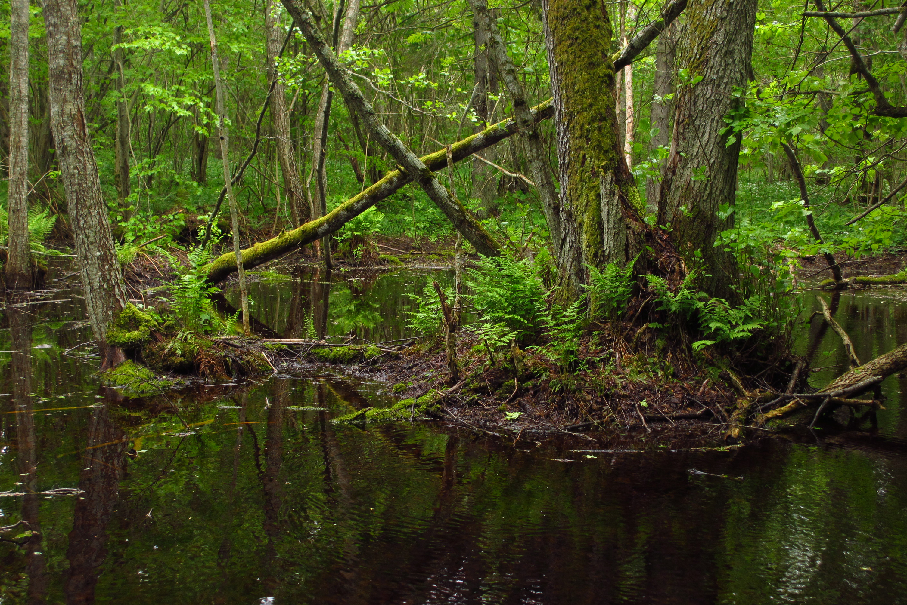 Abruka looduskaitseala